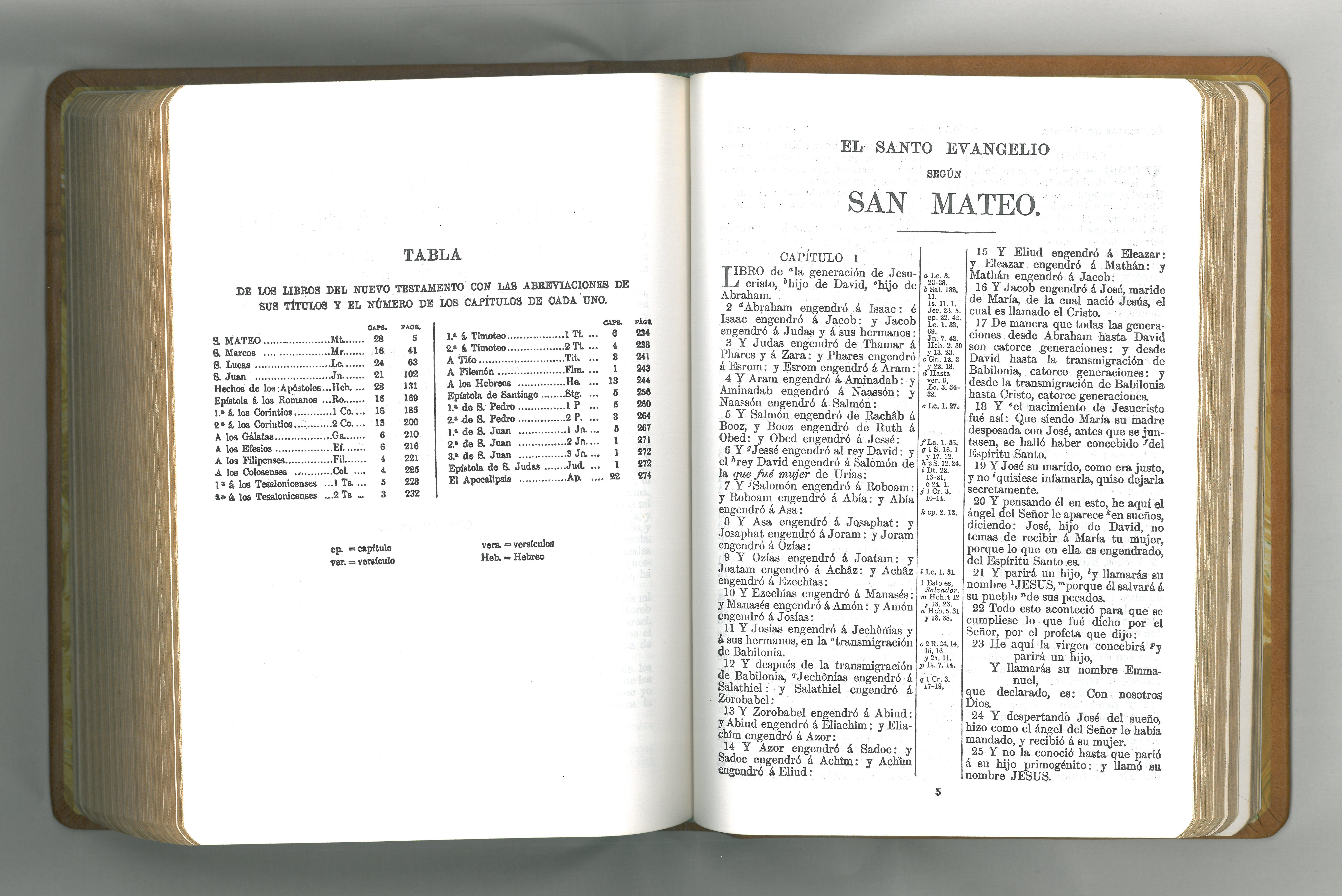 Biblia Reina-Valera 1909